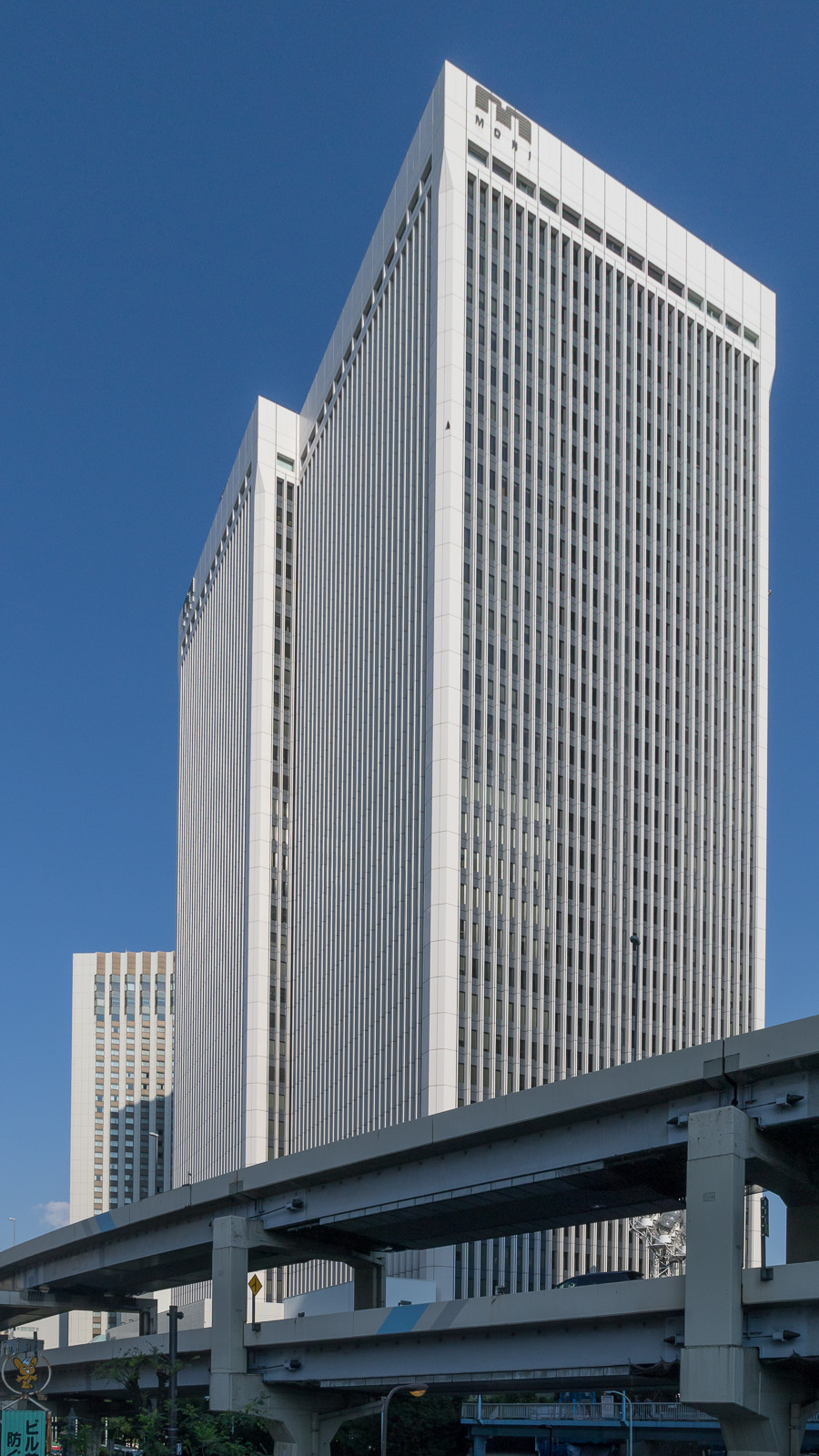 アークヒルズ、アーク森ビル。